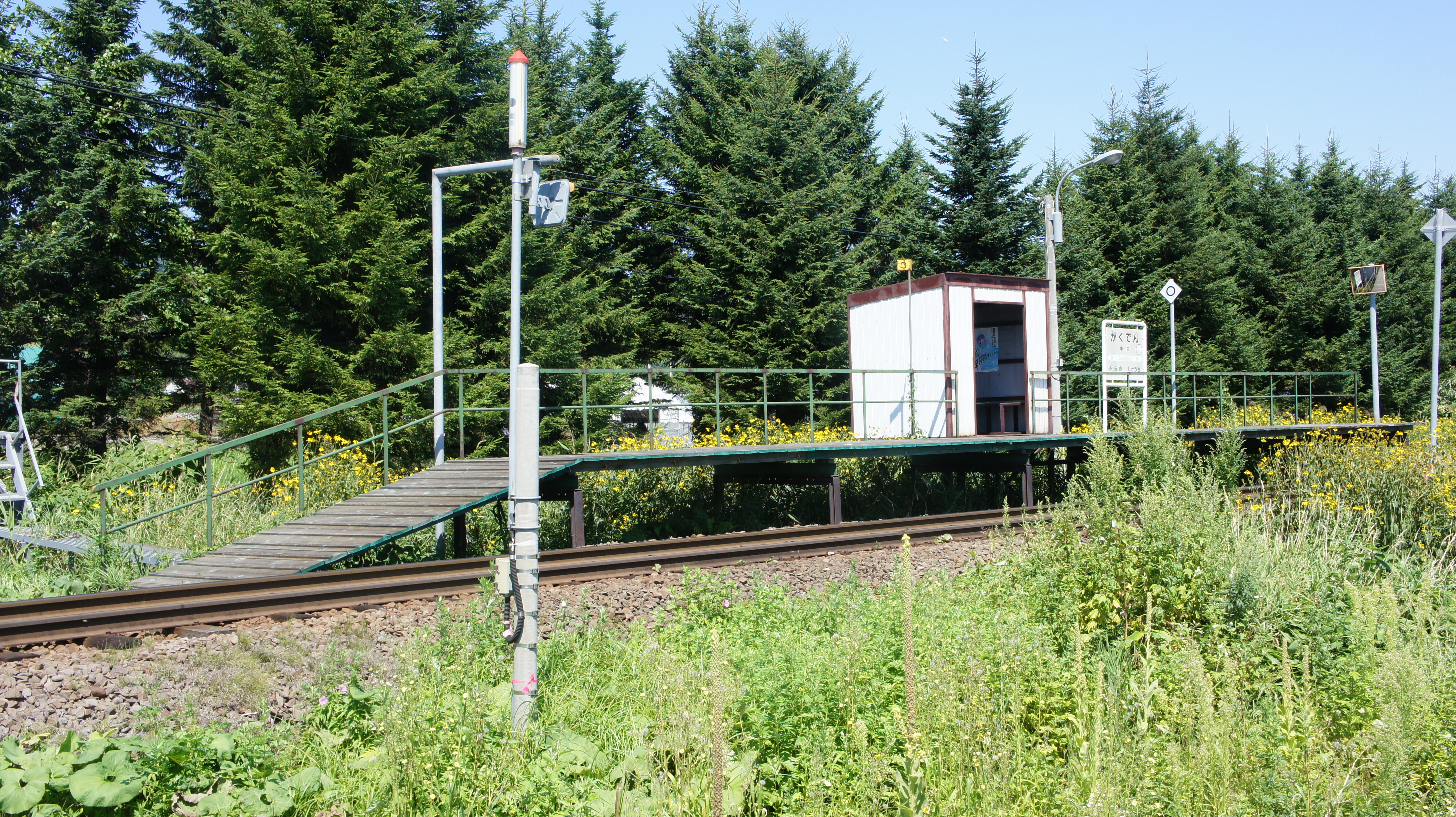 JR富良野線・学田駅全体